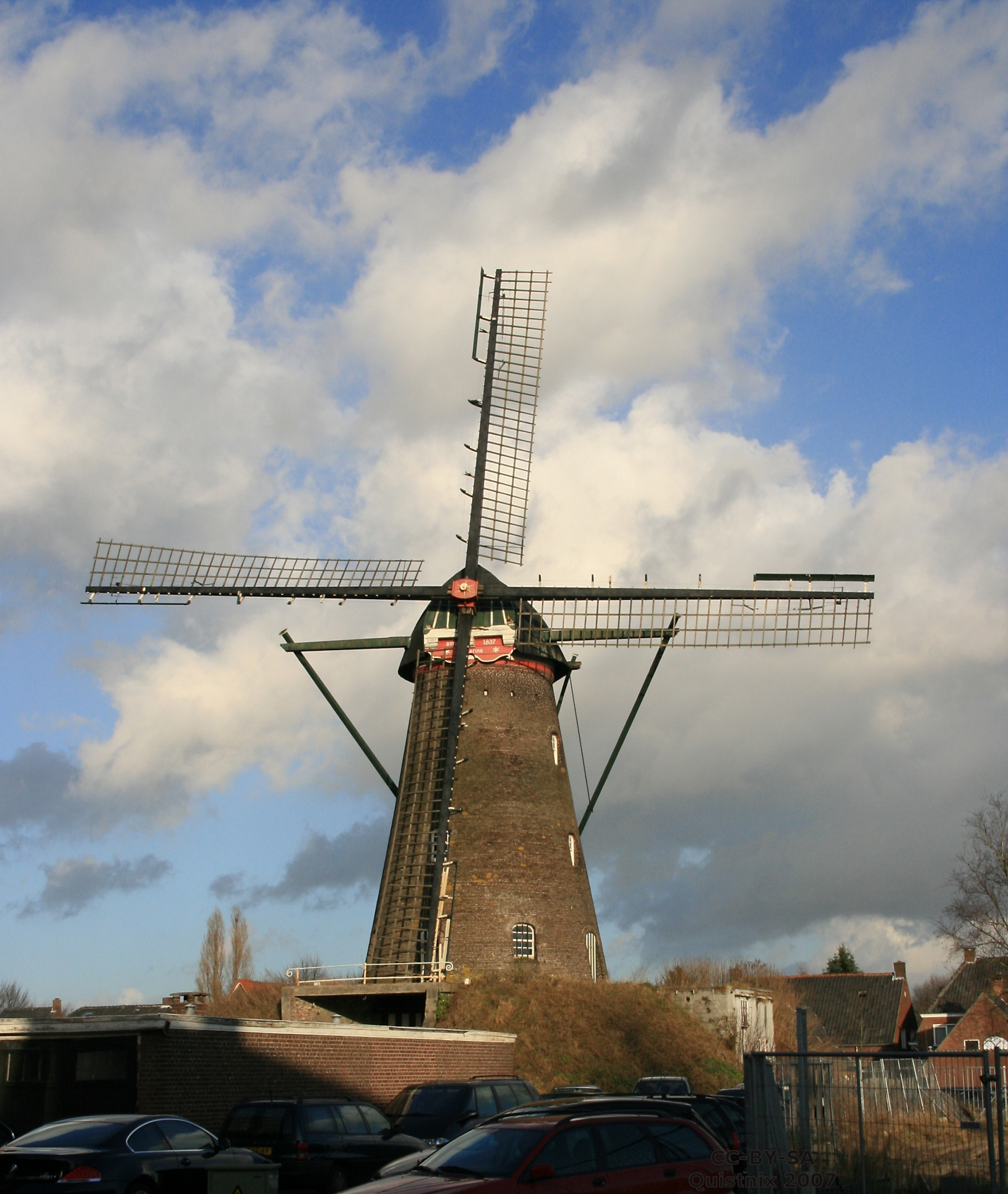 Schijndel, windmolen Catharina